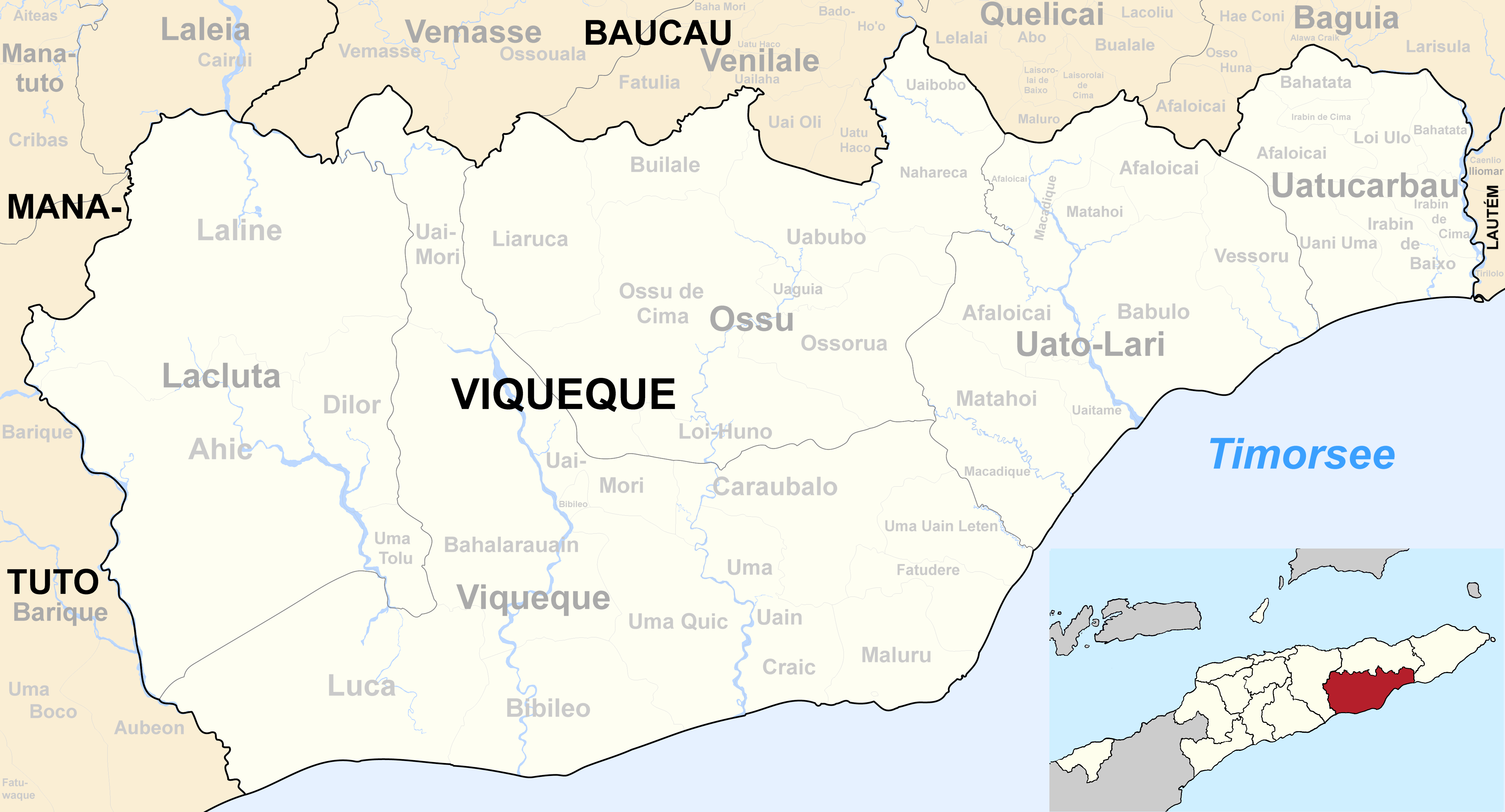 Verwaltungseinheiten der Gemeinde Viqueque, Osttimor.